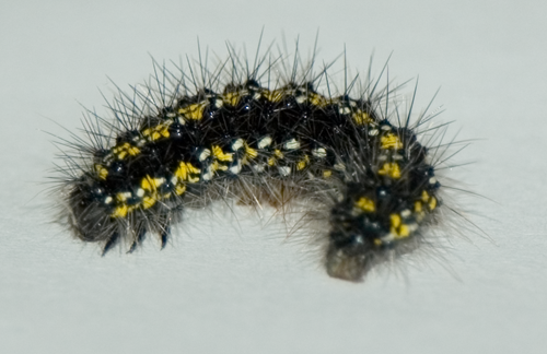 Callimorpha dominula Linnaeus, 1758